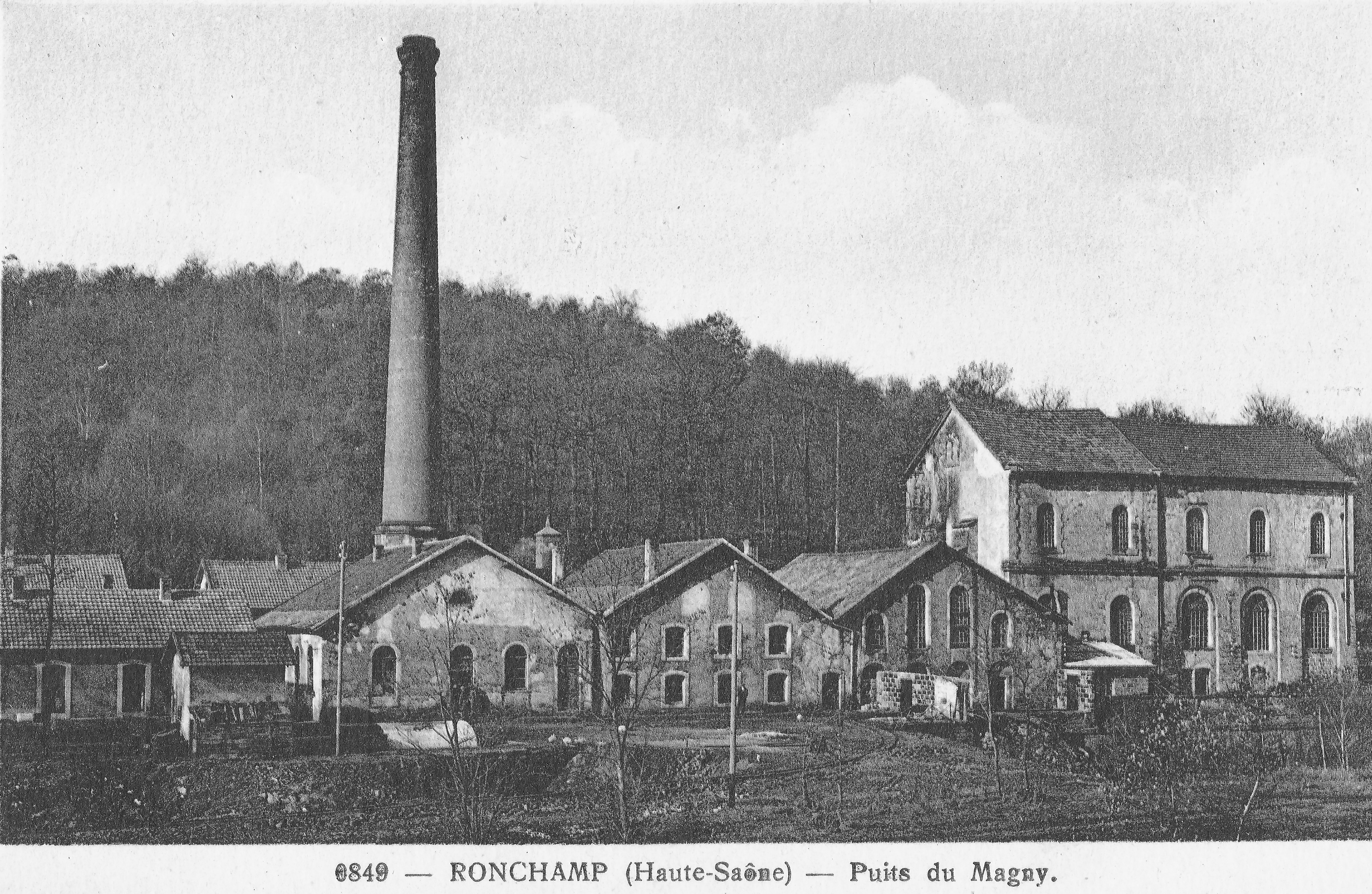 De gauche à droite : la cité minière, les bâtiments des chaudières et des machines, vestiaire-lampisterie puis le grand bâtiment du puits et de la machine d'extraction.